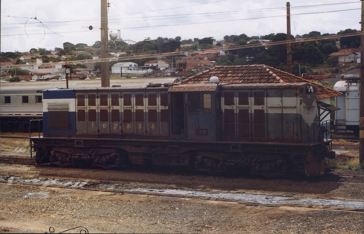 LEW DE I PA FERROBAN #7792 - Triagem Paulista - Bauru-SP-Brasil. Locomotiva ainda ostentava a pintura de transição entre a CP e a FEPASA